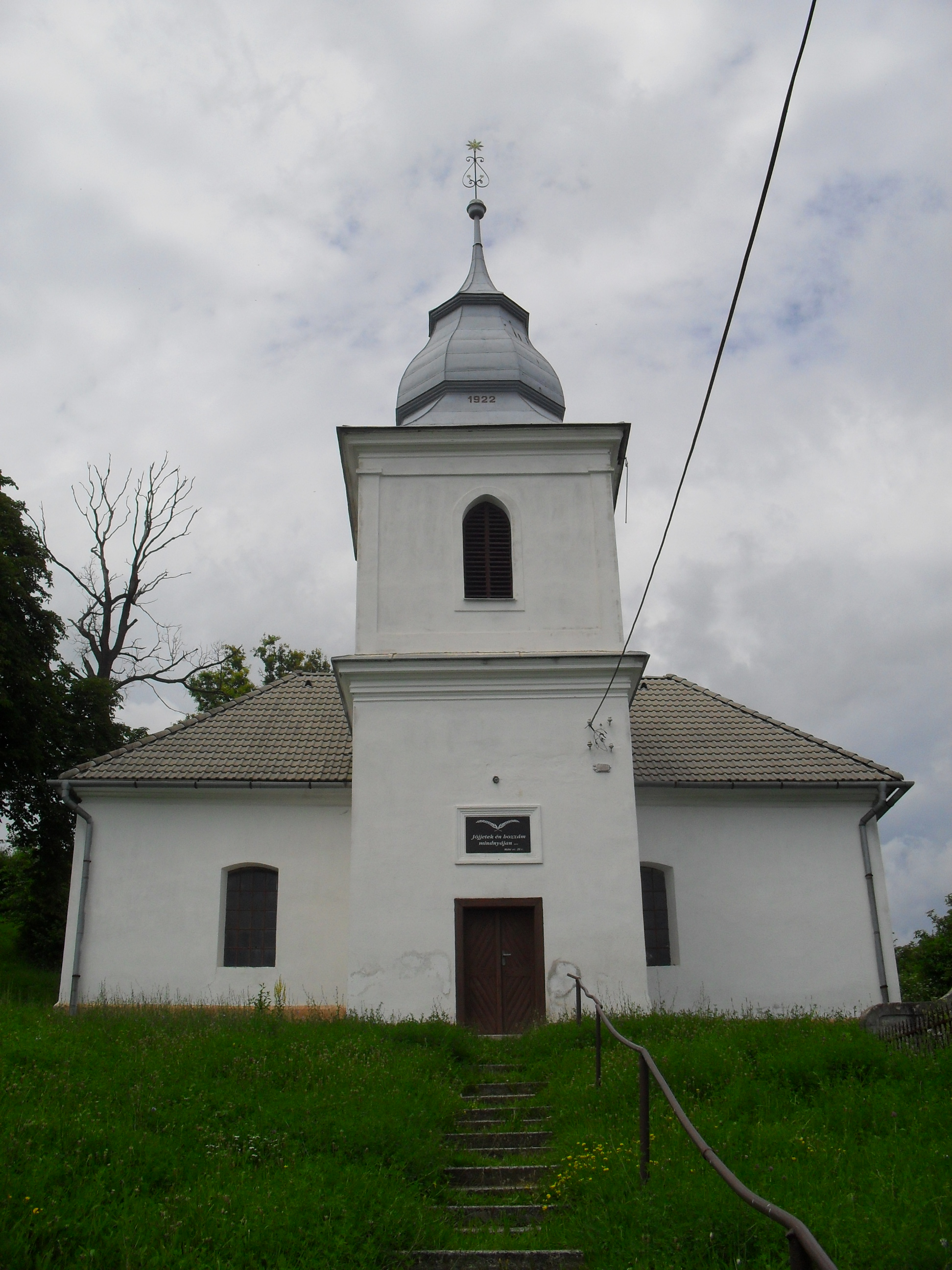 Balogtamási - református templom